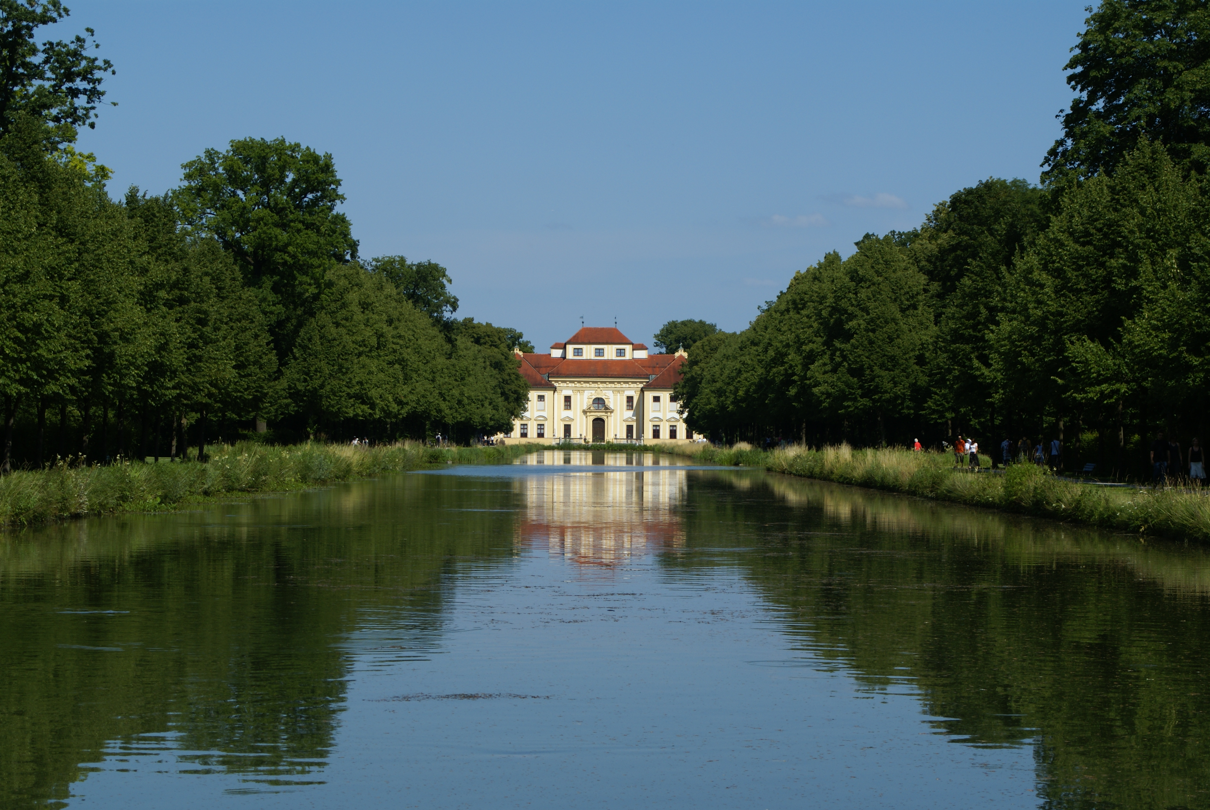 Castle Lustheim in Oberschleissheim, Germany